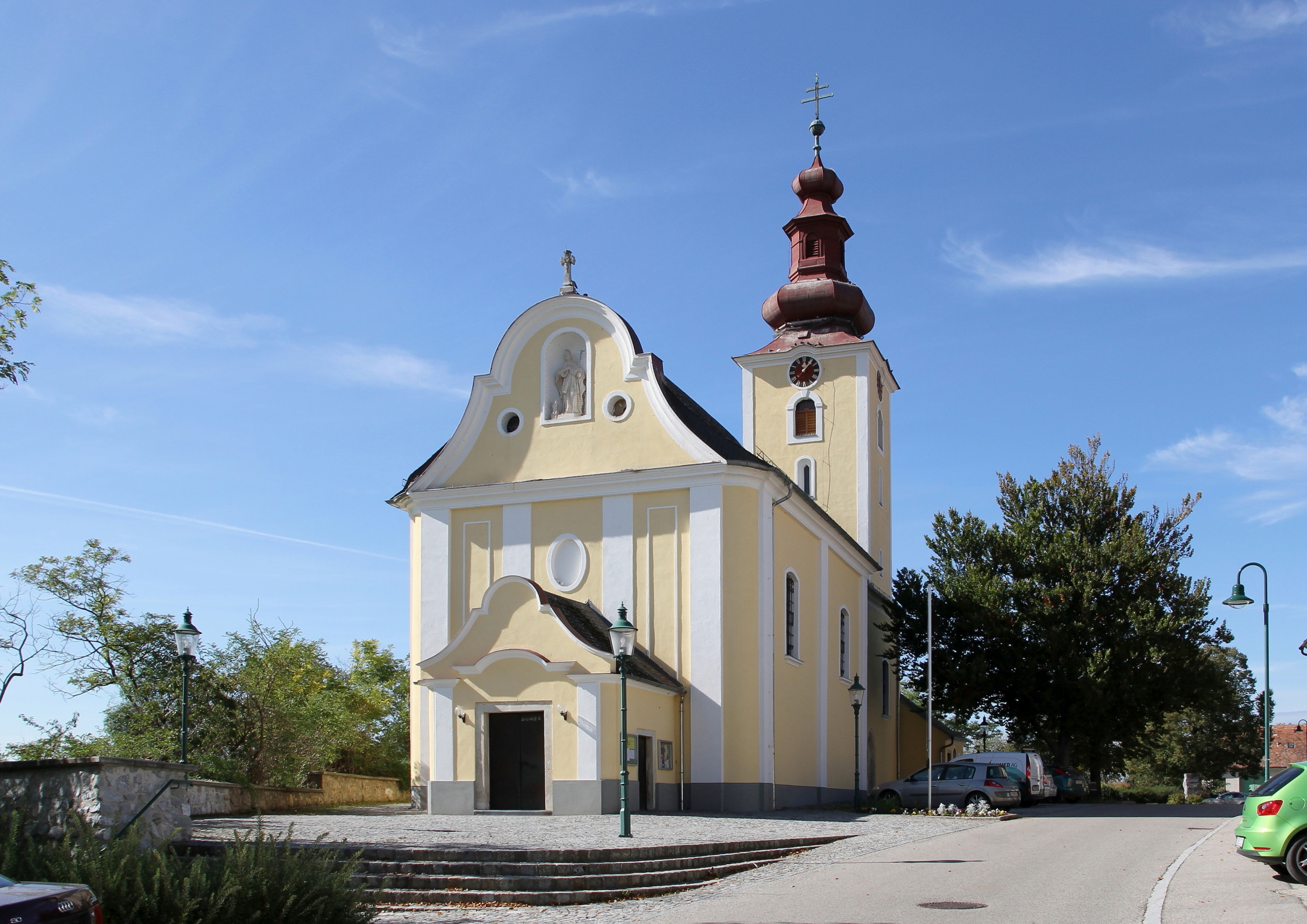 Katholische Pfarrkirche hl. Ägidius in Feuersbrunn, ein Ortsteil der niederösterreichischen Marktgemeinde Grafenwörth.